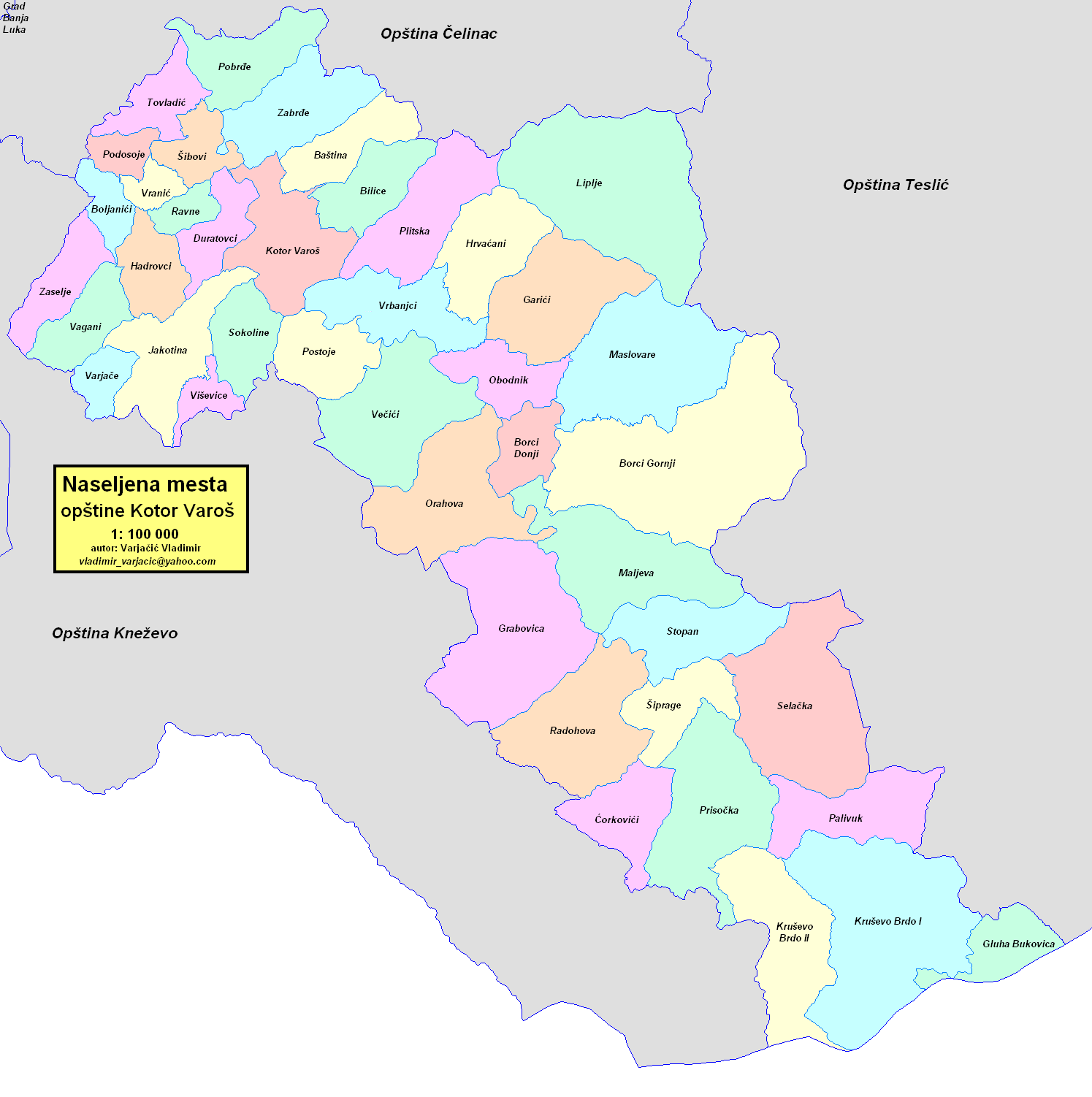 Opština Kotor Varoš